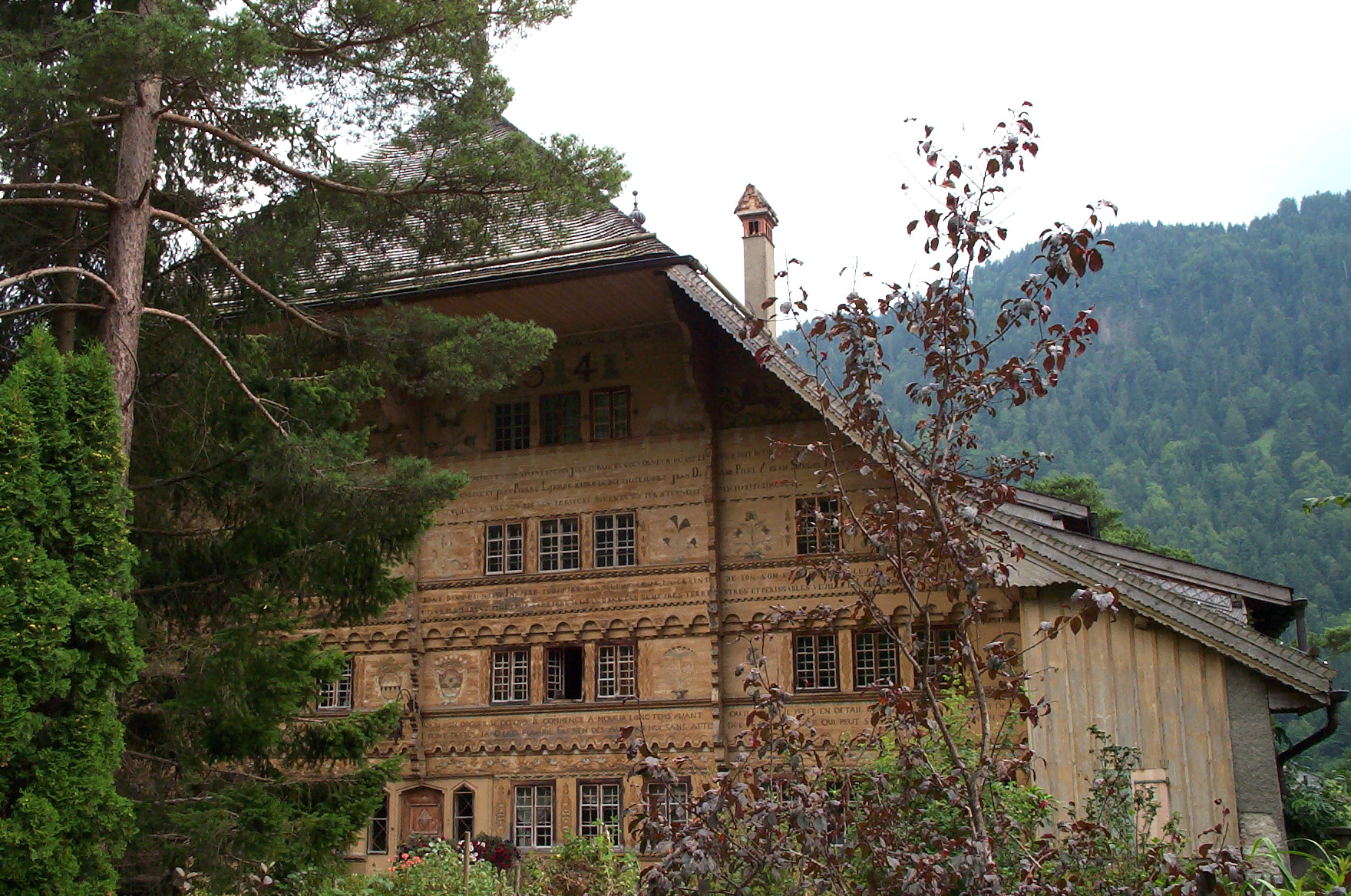 Chalet de Rossinière : façade avant